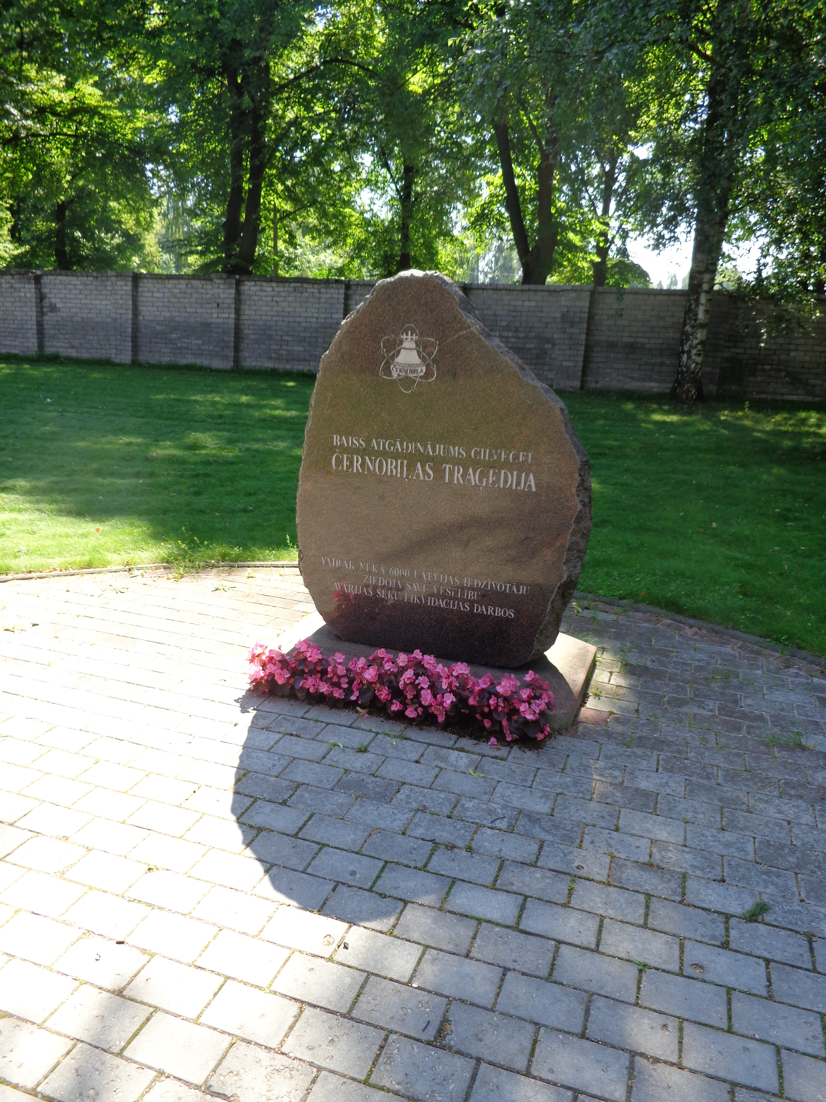 Rīga, Pilsoņu iela(street) 13